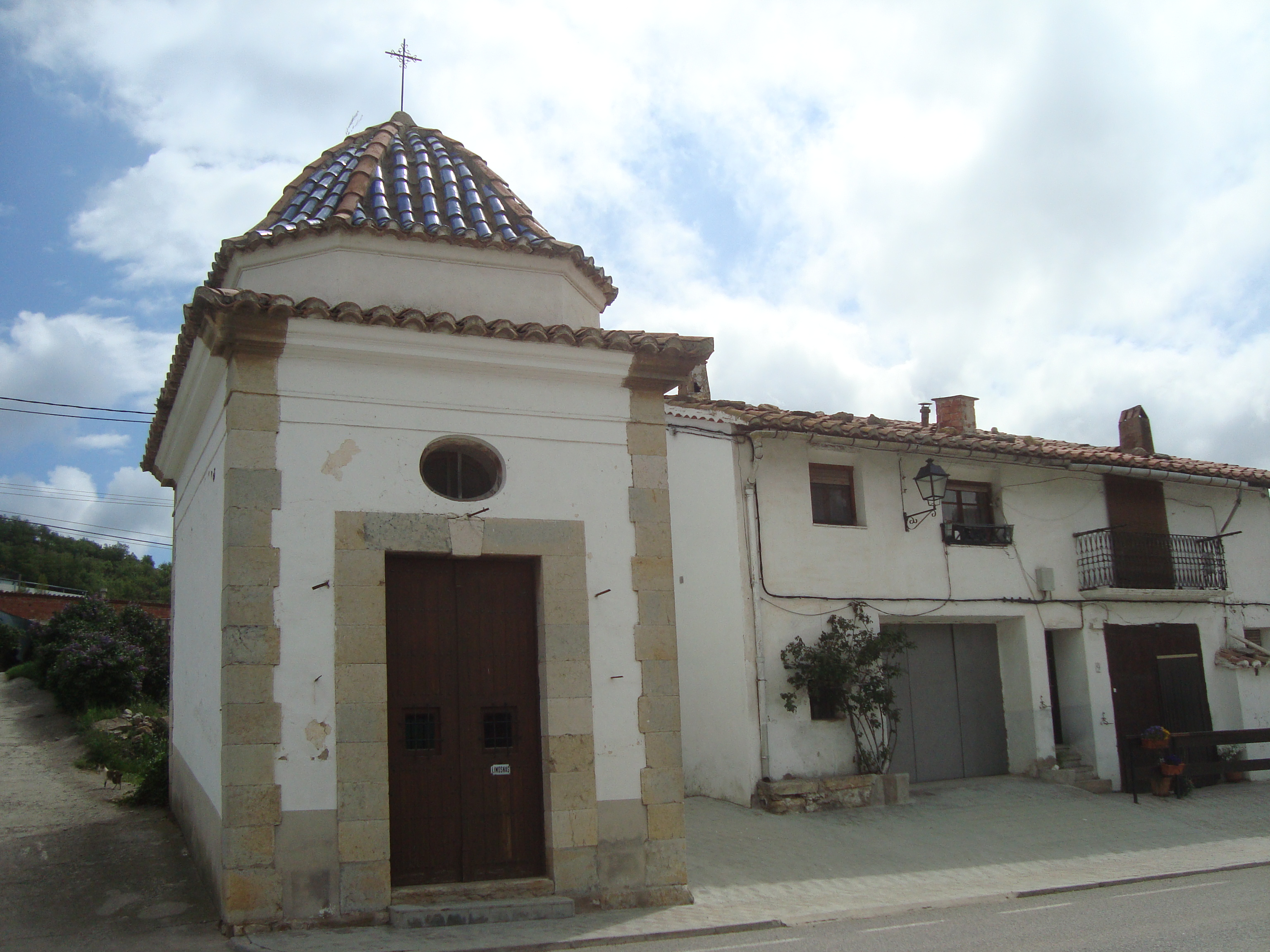 Ermita de la Virgen de la Vallivana o del Hostal Nou (Morella)